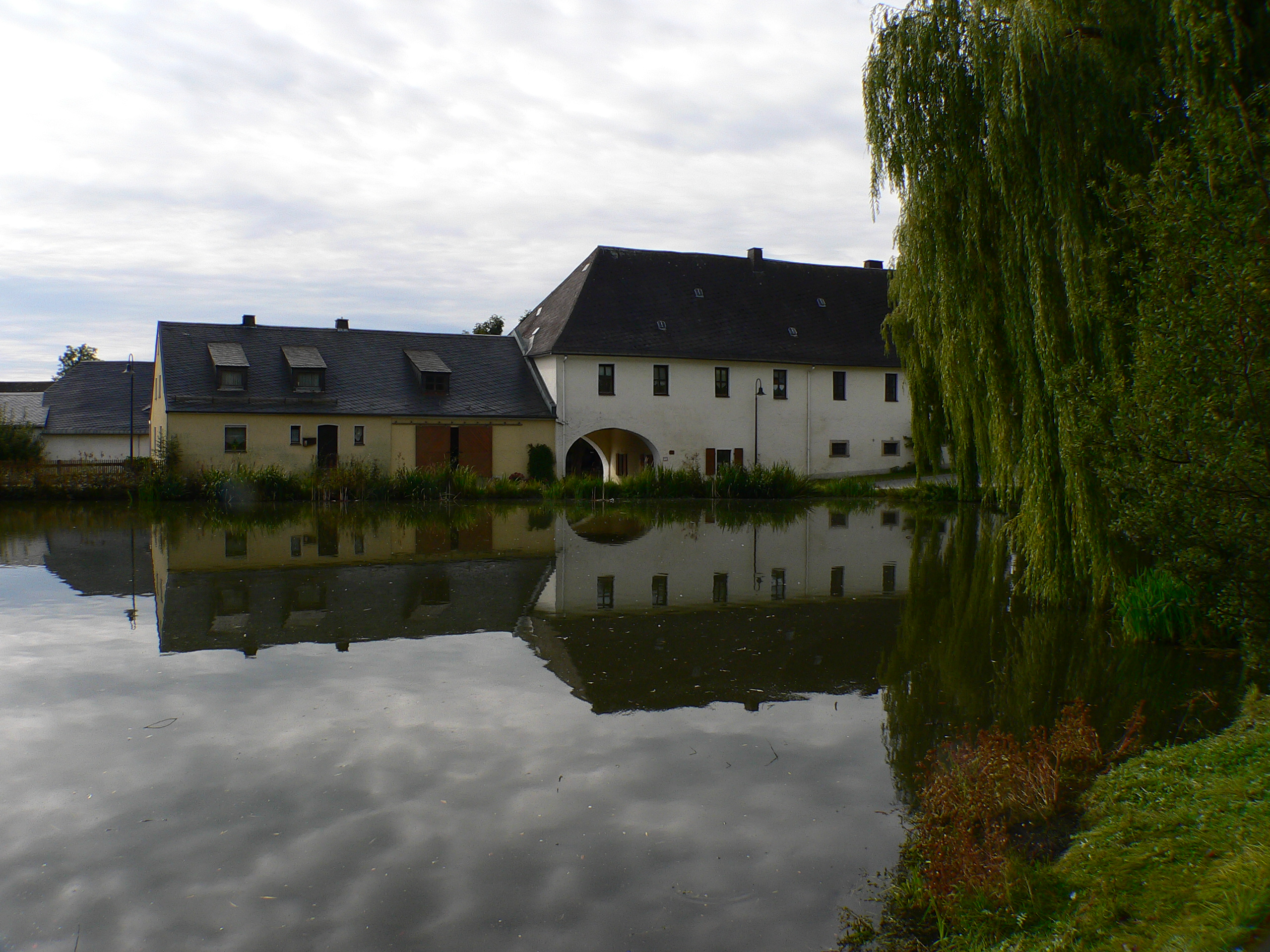 Rittersitz in Töpen-Isaar, Bayern, Regierungsbezirk Oberfranken, Landkreis Hof